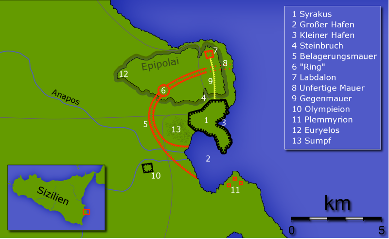 Die Belagerung Syarakus' durch Athen 414 v. Chr.